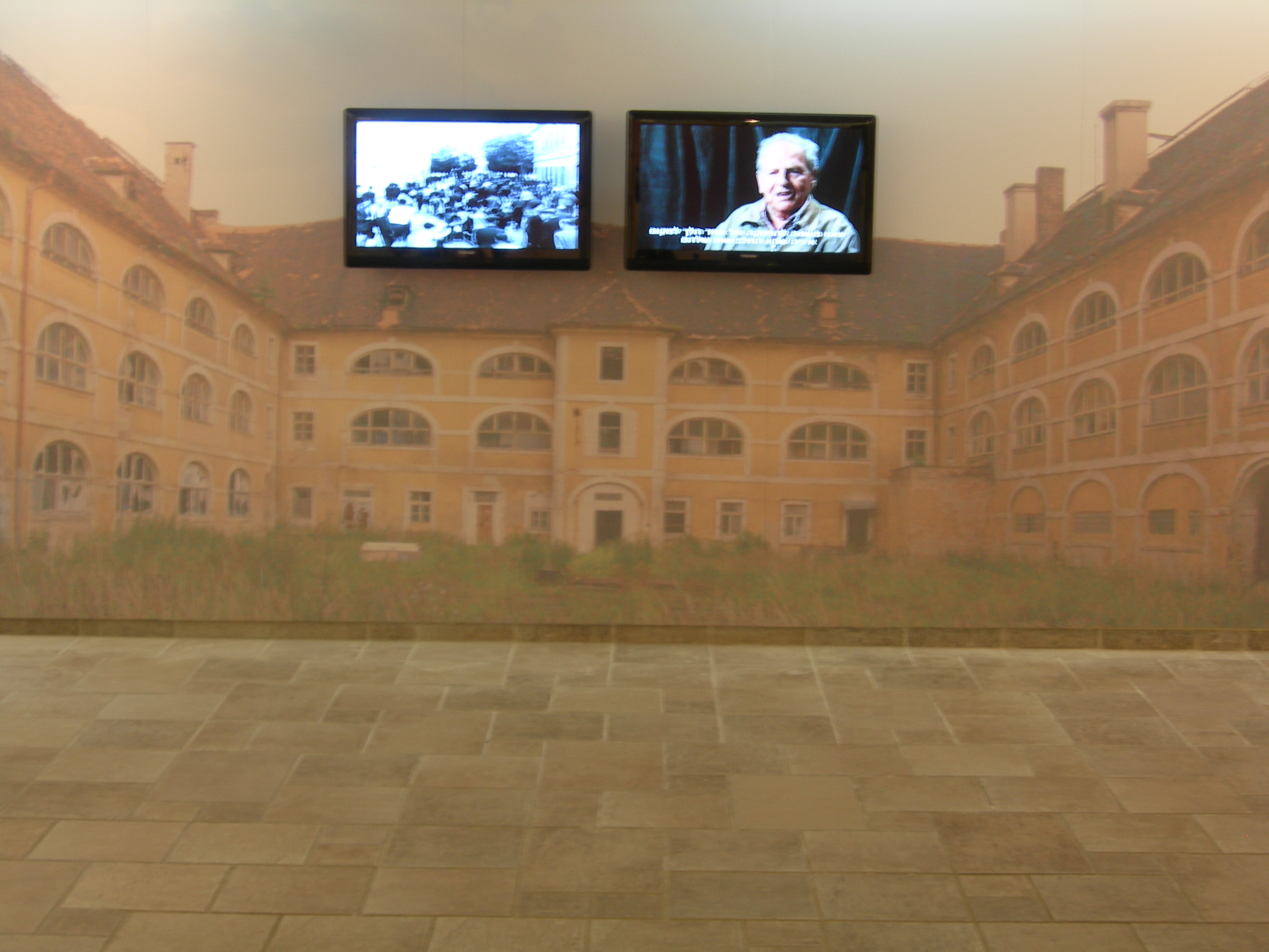 קיר הוידאו של התערוכה על רקע החצר בה שיחקו בגטו